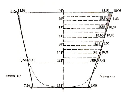 étude d'une clepsydre égyptienne